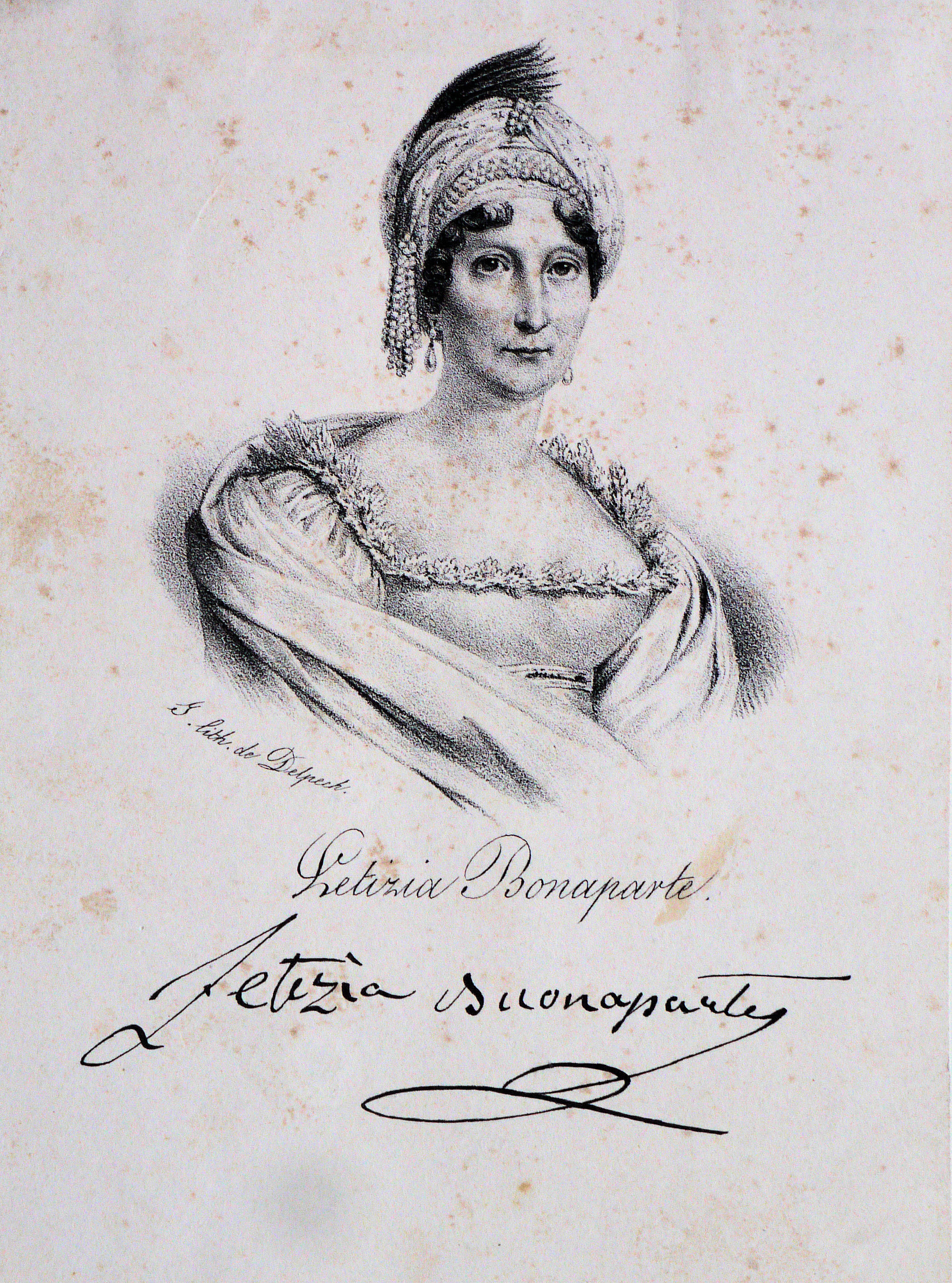 Letizia Bonaparte, geb. Ramolino (1750-1836), Mutter Napoleon I. Lithographie von Delpech, um 1820